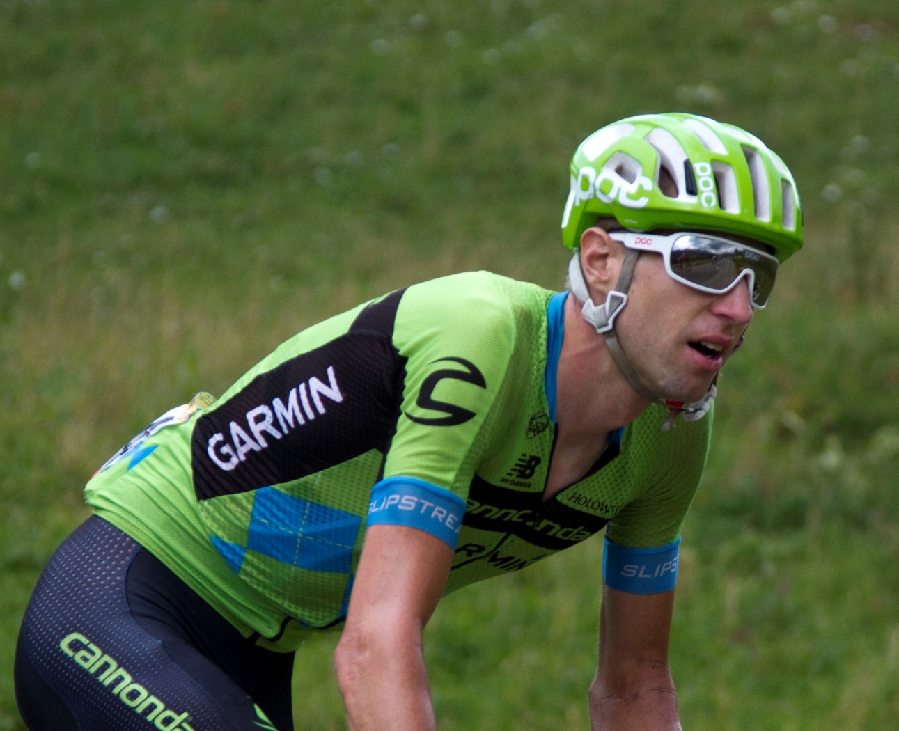 206 hesjedal